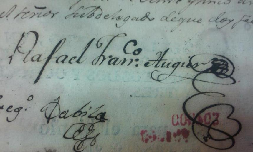 Firma Augier y Rojano de Oya y Ozores de Sotomayor. Documento producto de mi investigación personal.